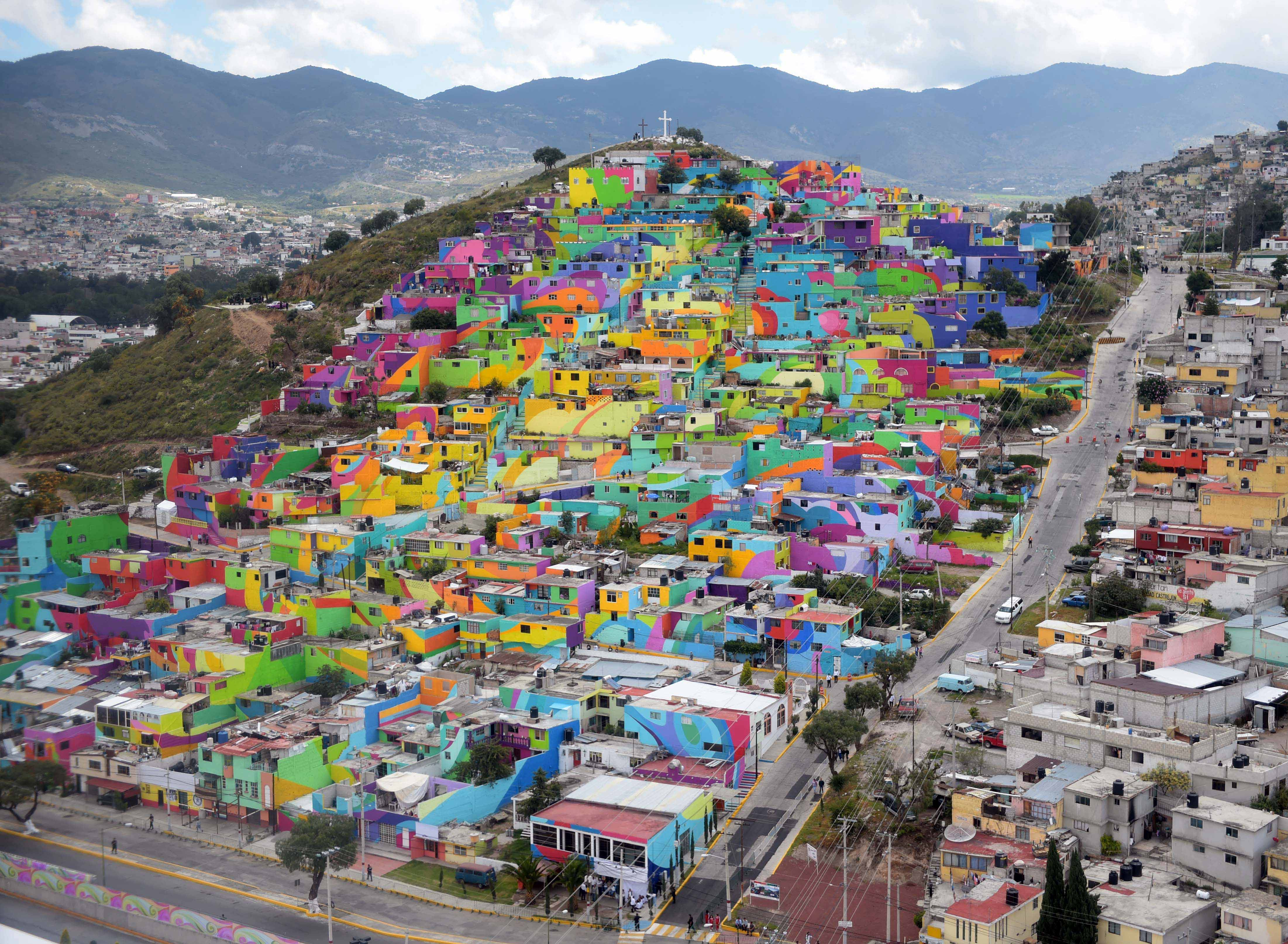 Inauguración del Macromural “Pachuca se Pinta”. Pachuca, Hidalgo. 31 de agosto de 2015.